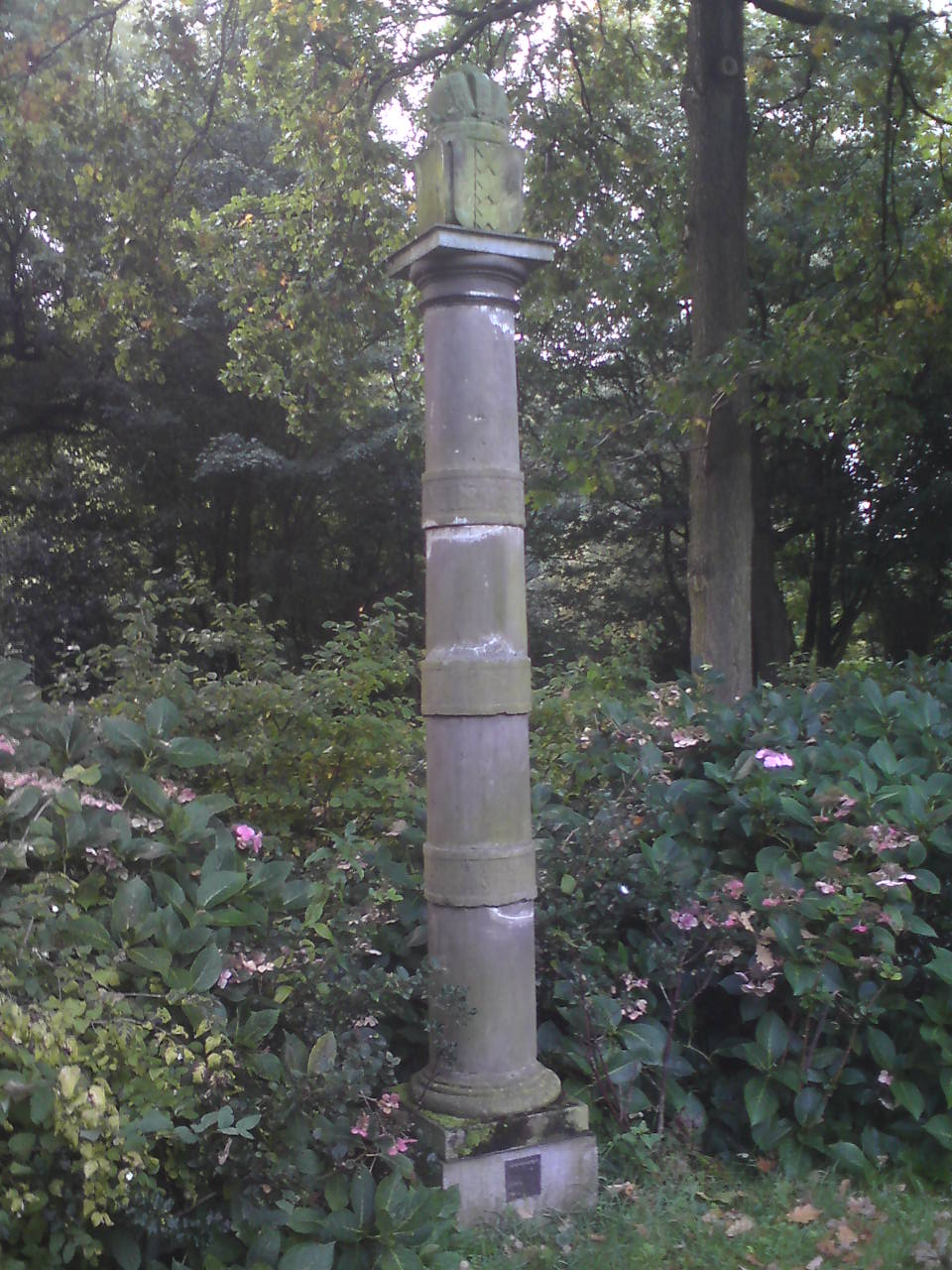 Werk: Ban- of limietpaal; Kunstenaar: Onbekend; Jaar: 1544 (verplaatst naar huidige locatie in 1838); Straat: Oosterpark; Materiaal: Hardsteen